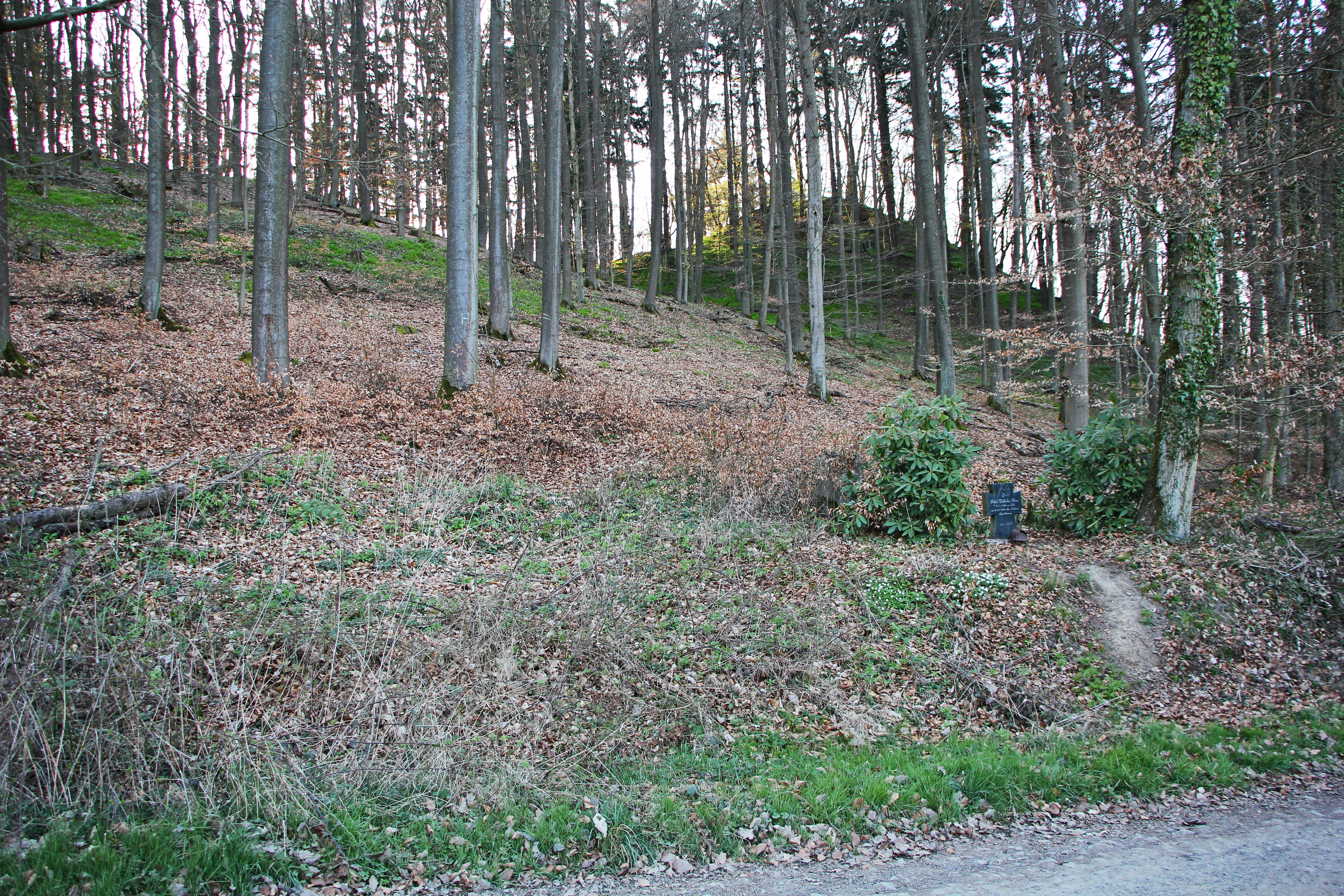 Zwei-gipfelige Bergkuppe der Burgruine bei Caldern, Lahntal, Landkreis Marburg-Biedenkopf. Ansicht von Südosten. Die Turmburg befand sich auf dem höheren (rechten) Gipfel. Im Vordergrund der Gedenkstein für den 19-jährigen Piloten, dessen Jagdflugzeug hier am 2. Dezember 1944 abgestürzt ist.